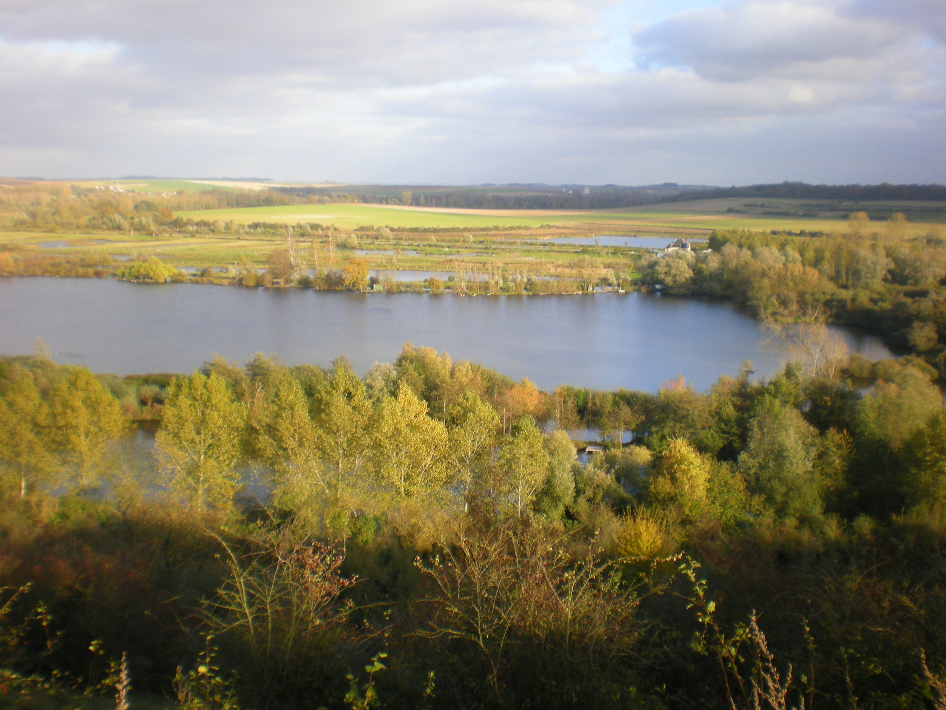 Vue depuis le belvédère du camp de César, commune de Chipilly, Somme.